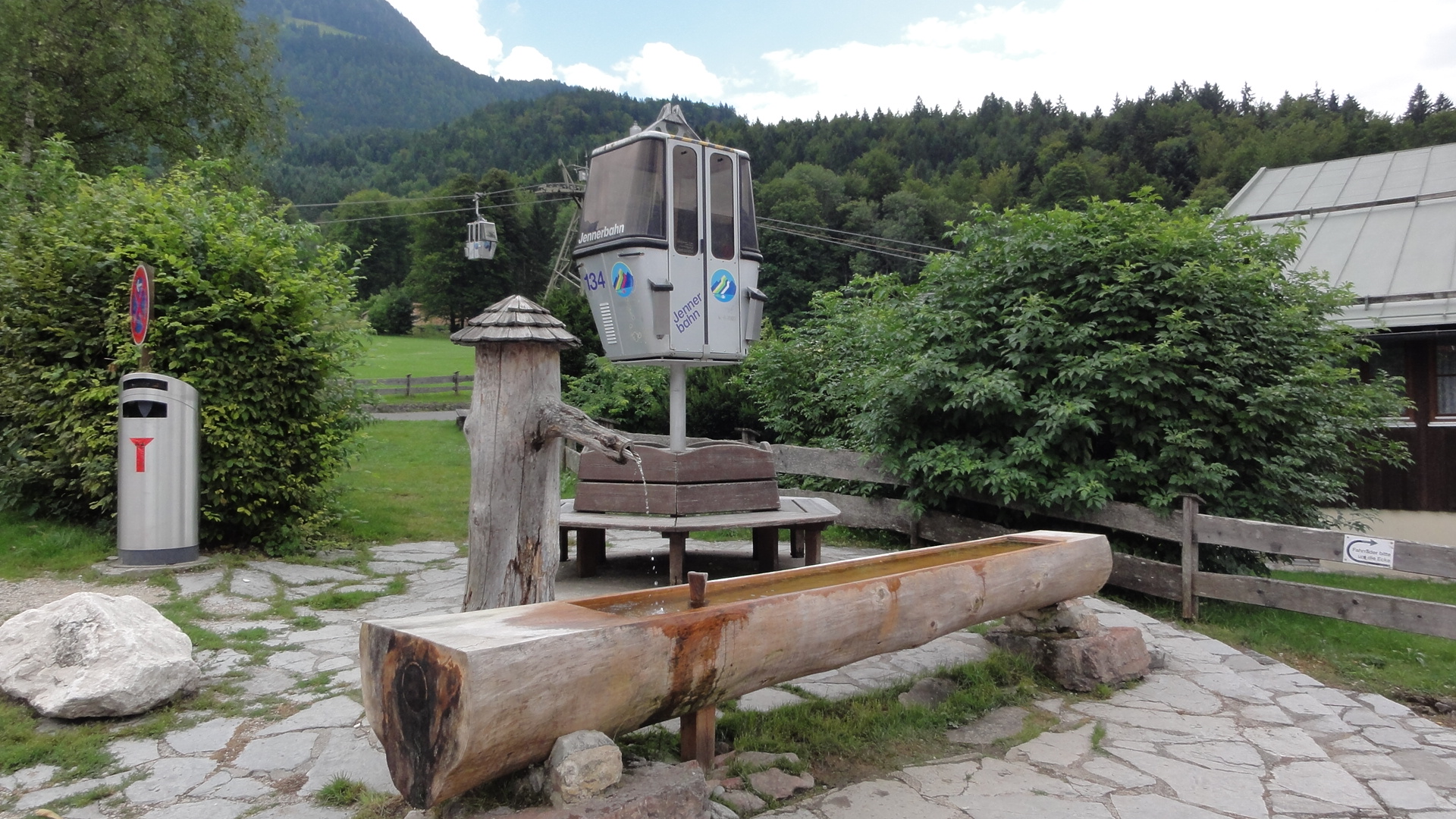 Germany, Bavaria, Schönau am Königssee